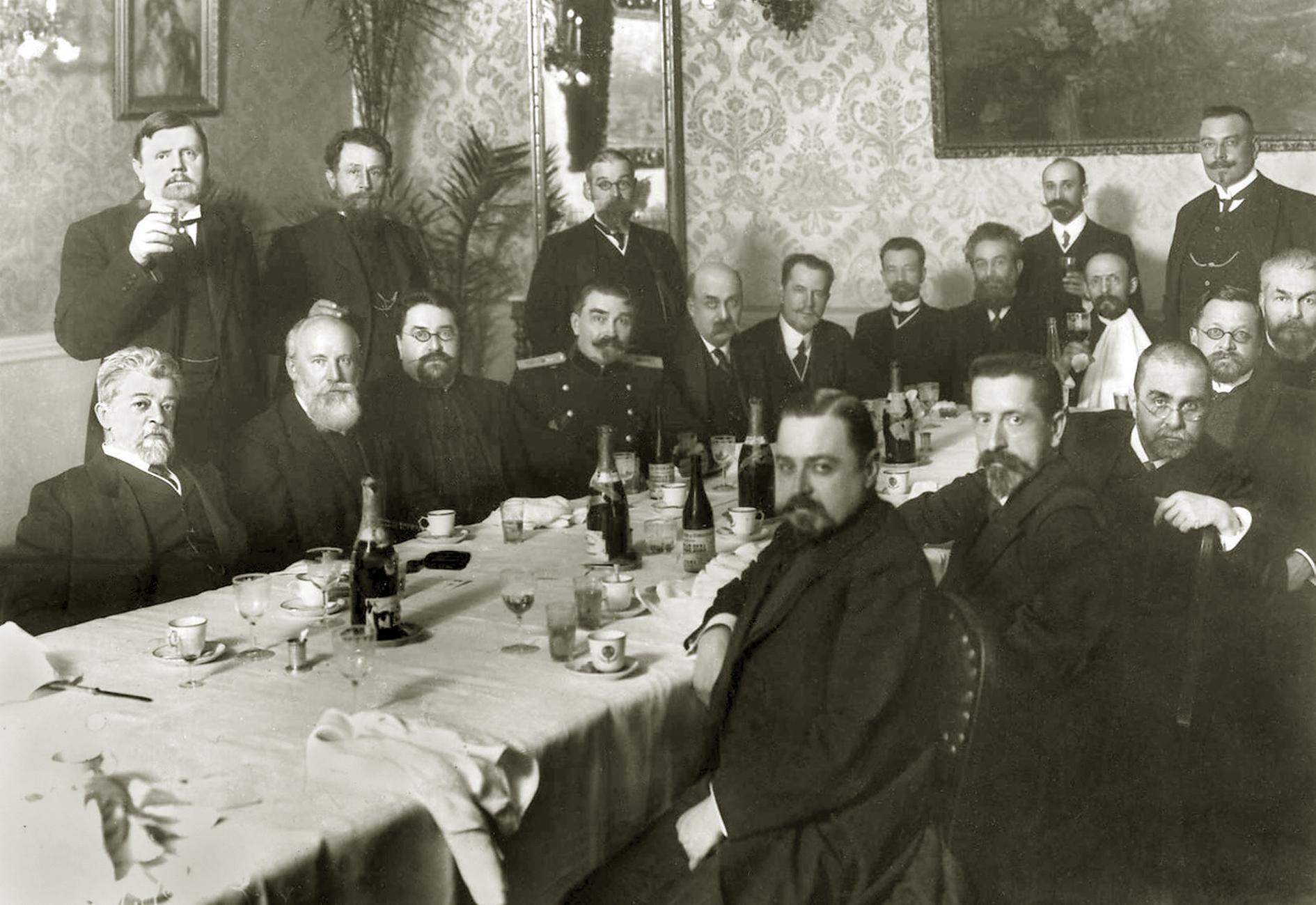 Чествование профессора Женского медицинского института СПб Салазкина С. С. Присутствуют Салазкин С. С., Кадьян А. А., Левин А. М., Тила В. А., Смирнов. Профессор Д. А. Соколов от центра, третий справа.